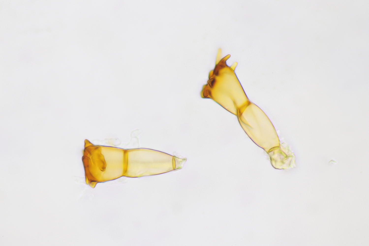 Puccinia coronata, Teleutospore auf Phalaris arundinacea